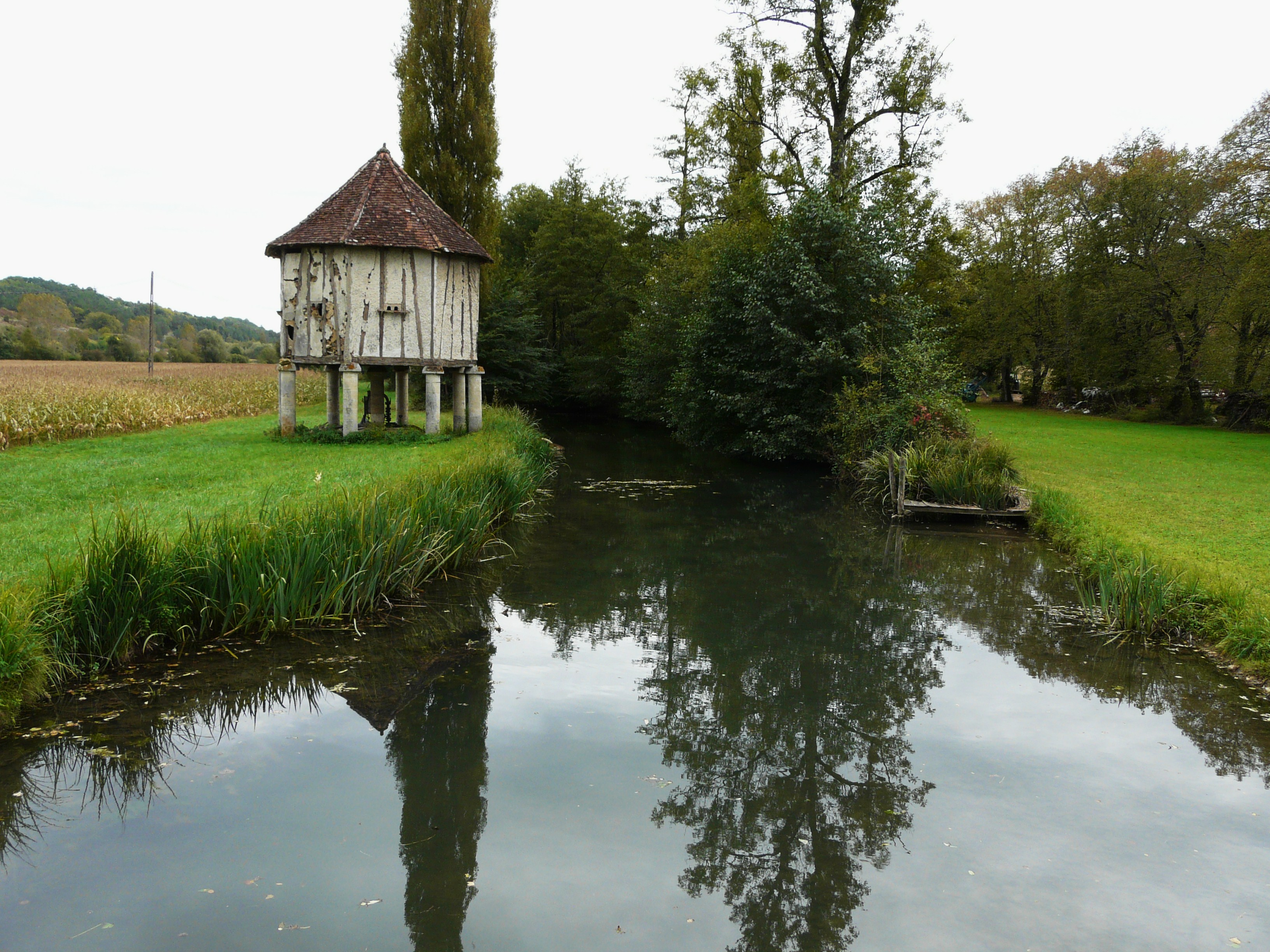 Le Manoire à Lieu-Dieu, Boulazac, Dordogne, France